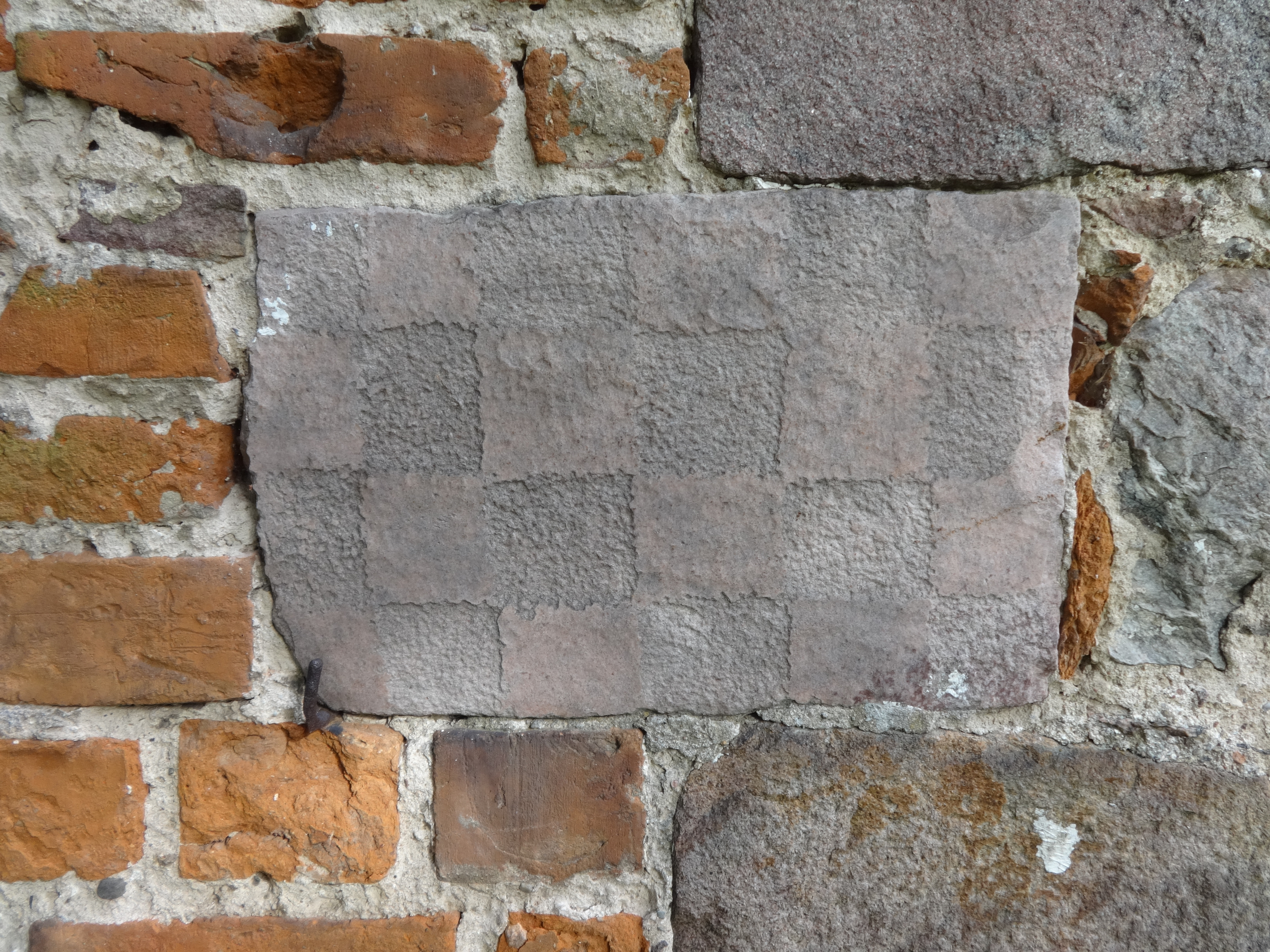 Die Dorfkirche in Kleinbeeren, Gemeinde Großbeeren im Landkreis Teltow-Fläming im Land Brandenburg entstand in der zweiten Hälfte des 13. Jahrhunderts. Im Innern steht unter anderem ein Kanzelaltar aus der Zeit um 1700.